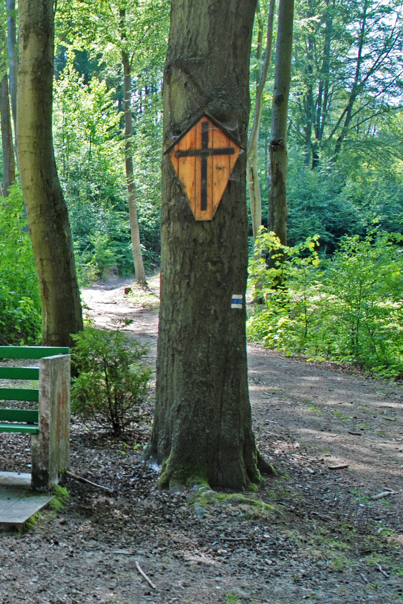 Křížek na rozcestí "U Křížku" v karlovarských lázeňských lesích